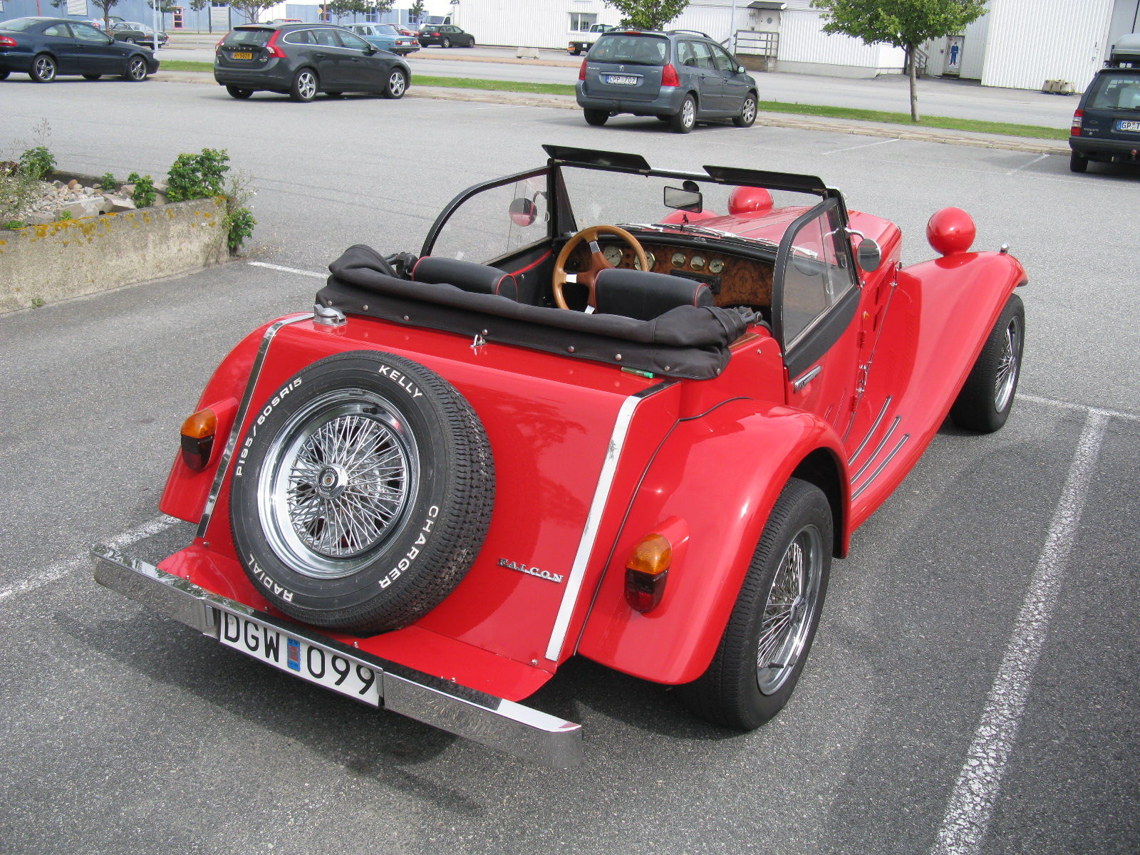 Falcon Sport Roadster